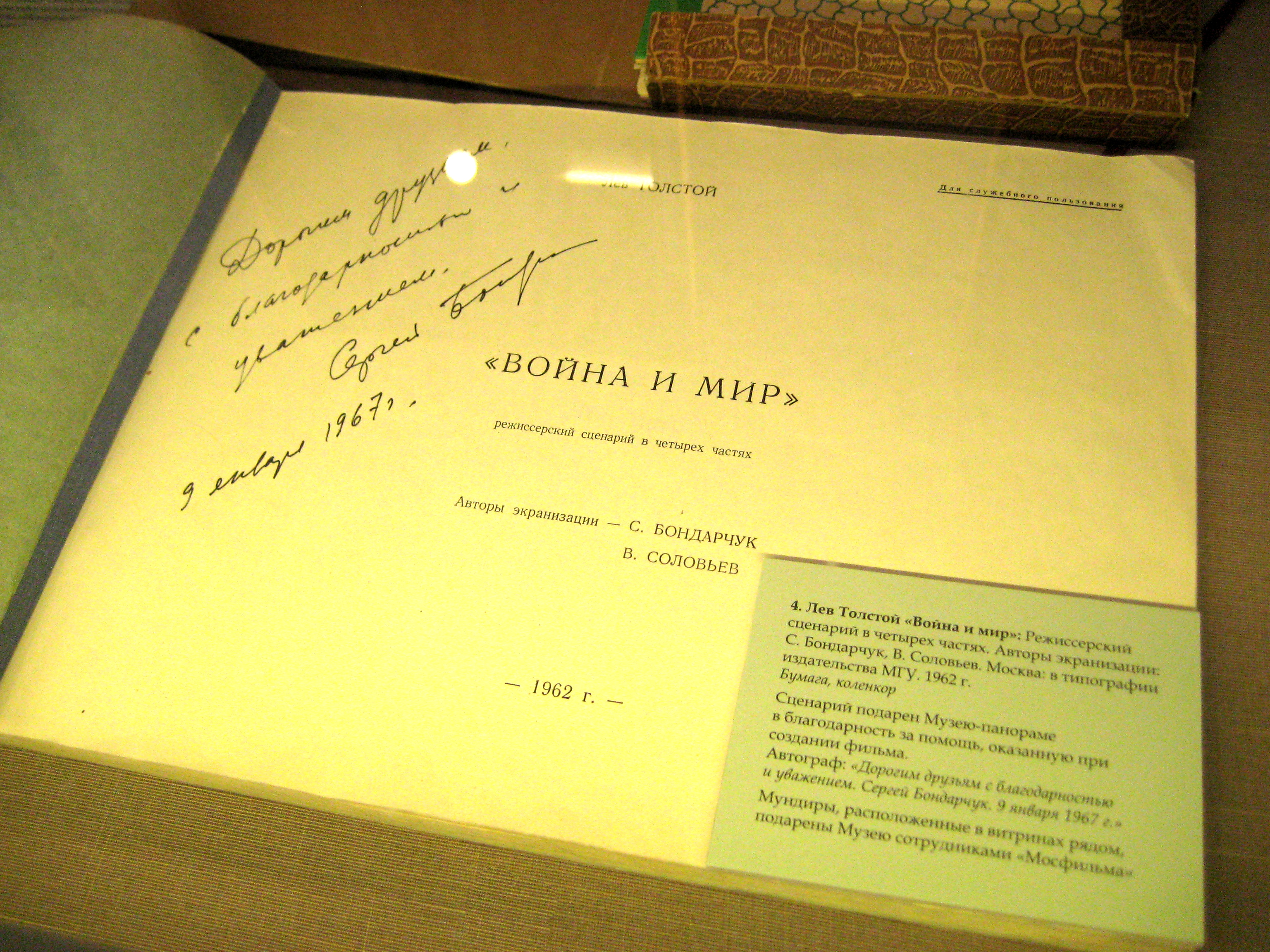 Режиссерский сценарий "Войны и мира" Бондарчука. Музей "Бородинская панорама"